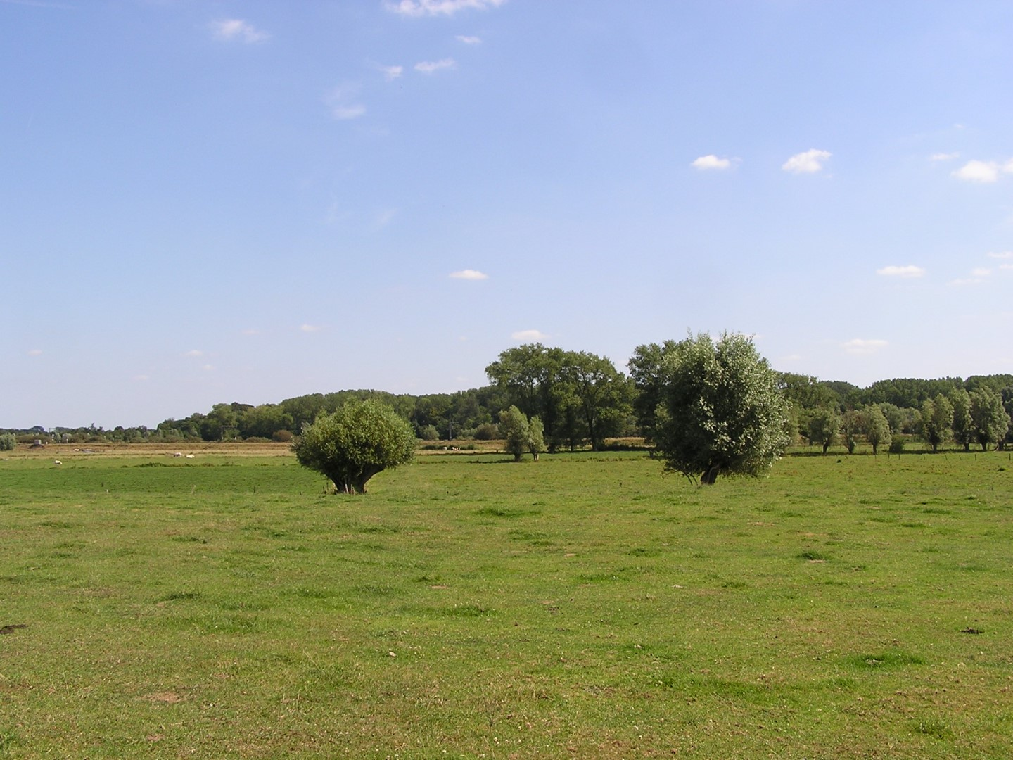 Wulgenbroeken (1)